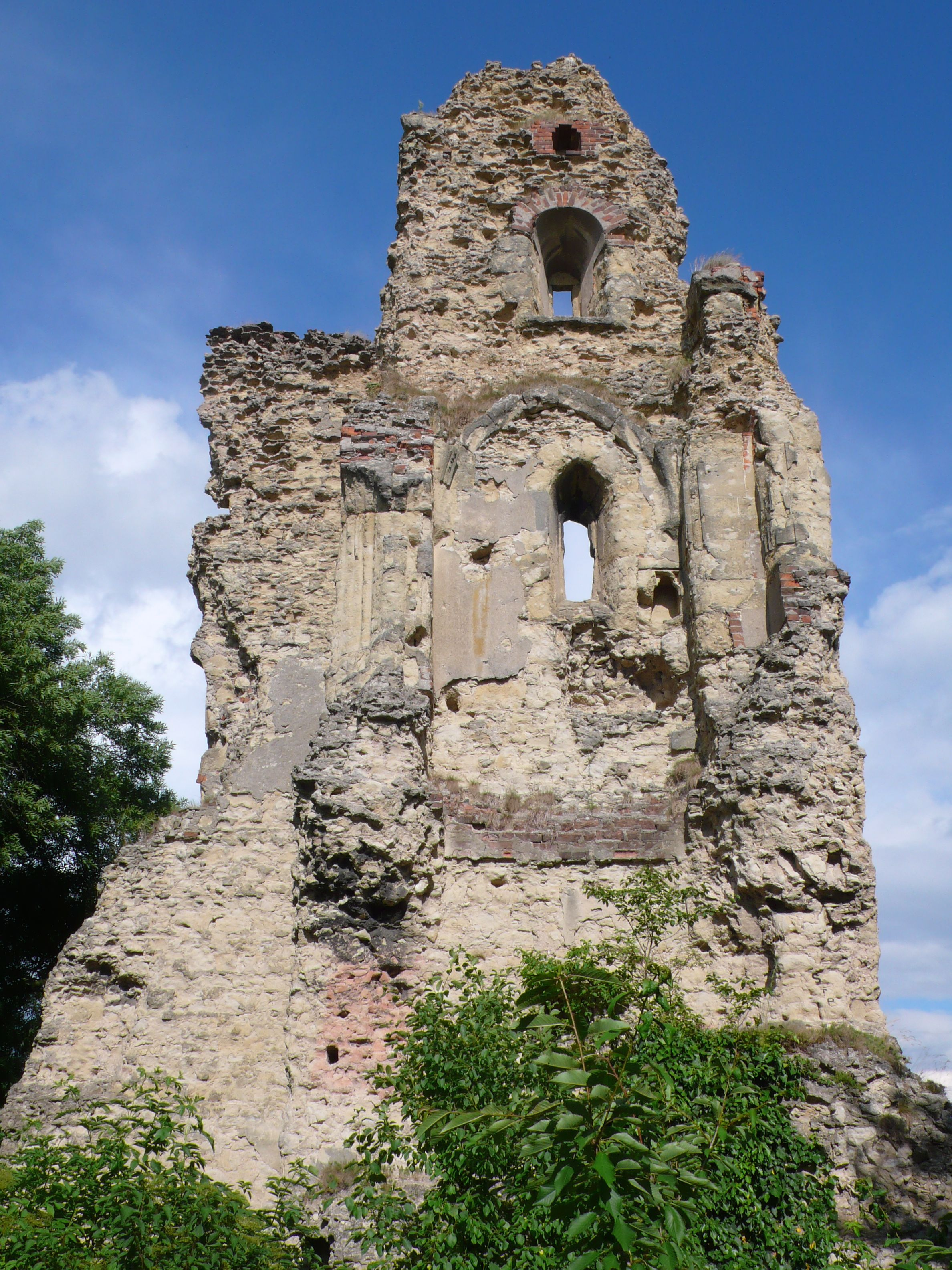 Interiér paláce a věže s kaplí s otisky žebrové klenby kaple od západu